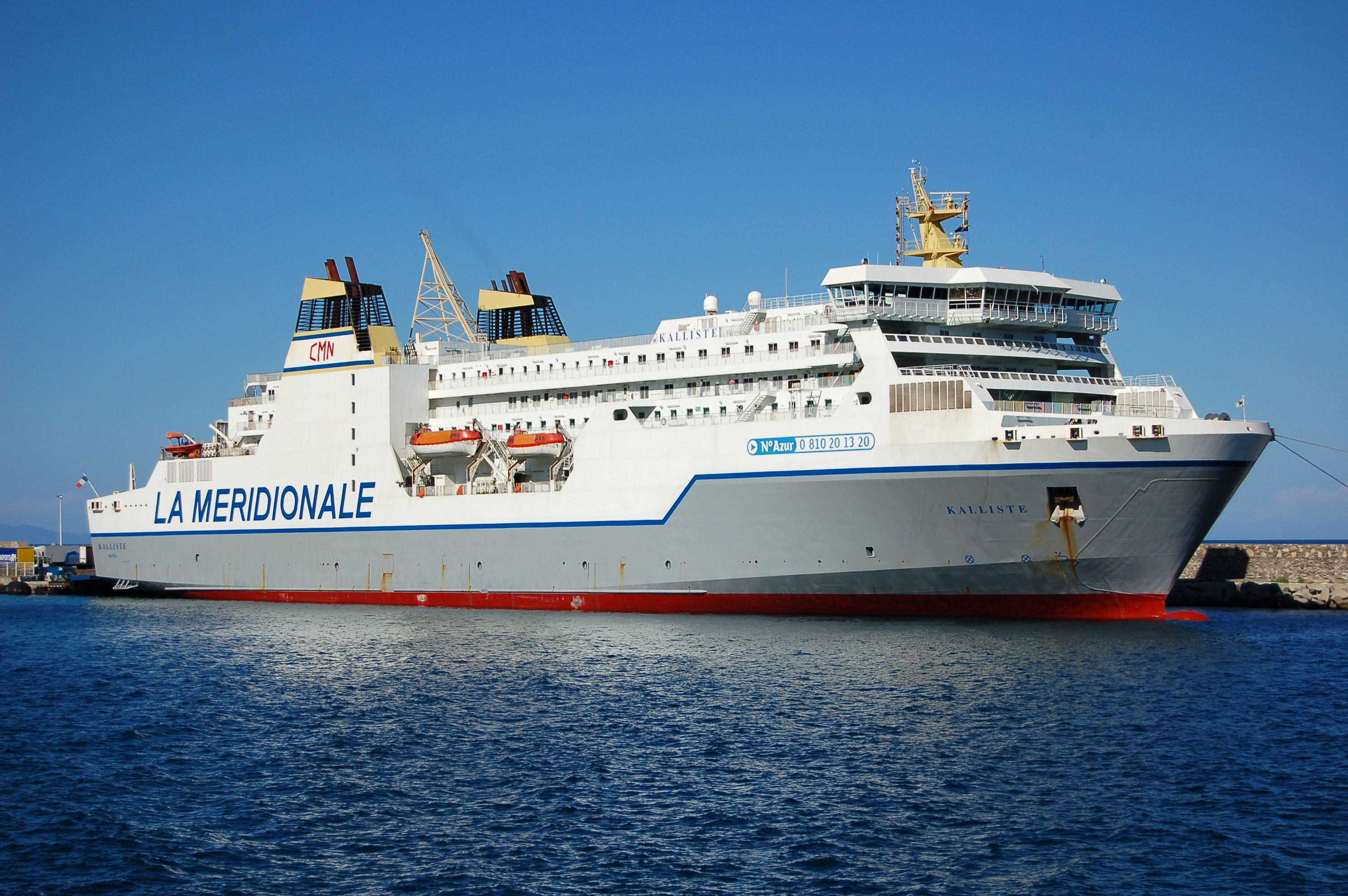 Kalliste dans le port de Bastia. IMO Number: 9050618 MMSI Number: 227202000 Callsign: FNEH Length: 165 m Beam: 26 m